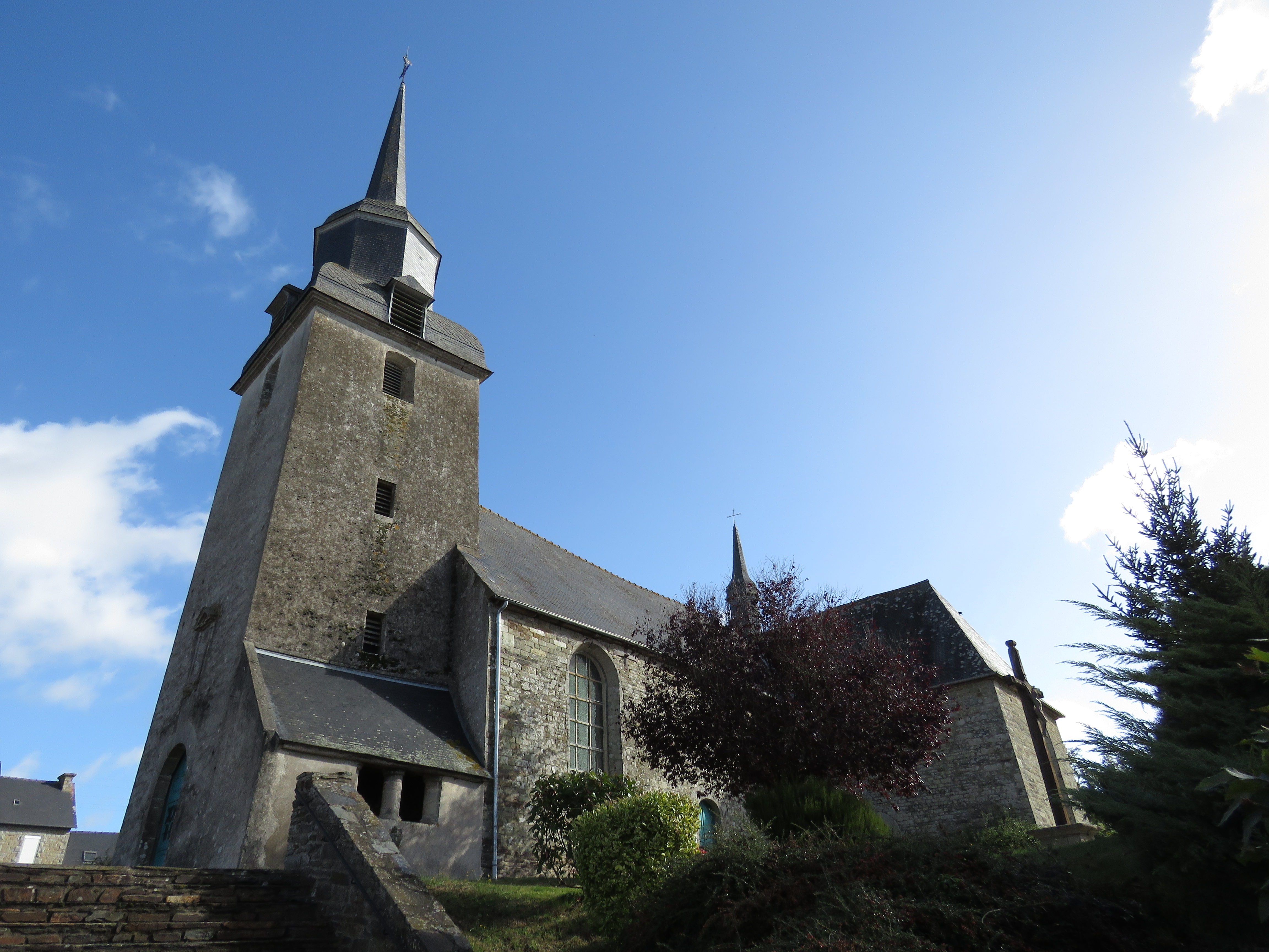 Église Notre-Dame de Grâce-Uzel.